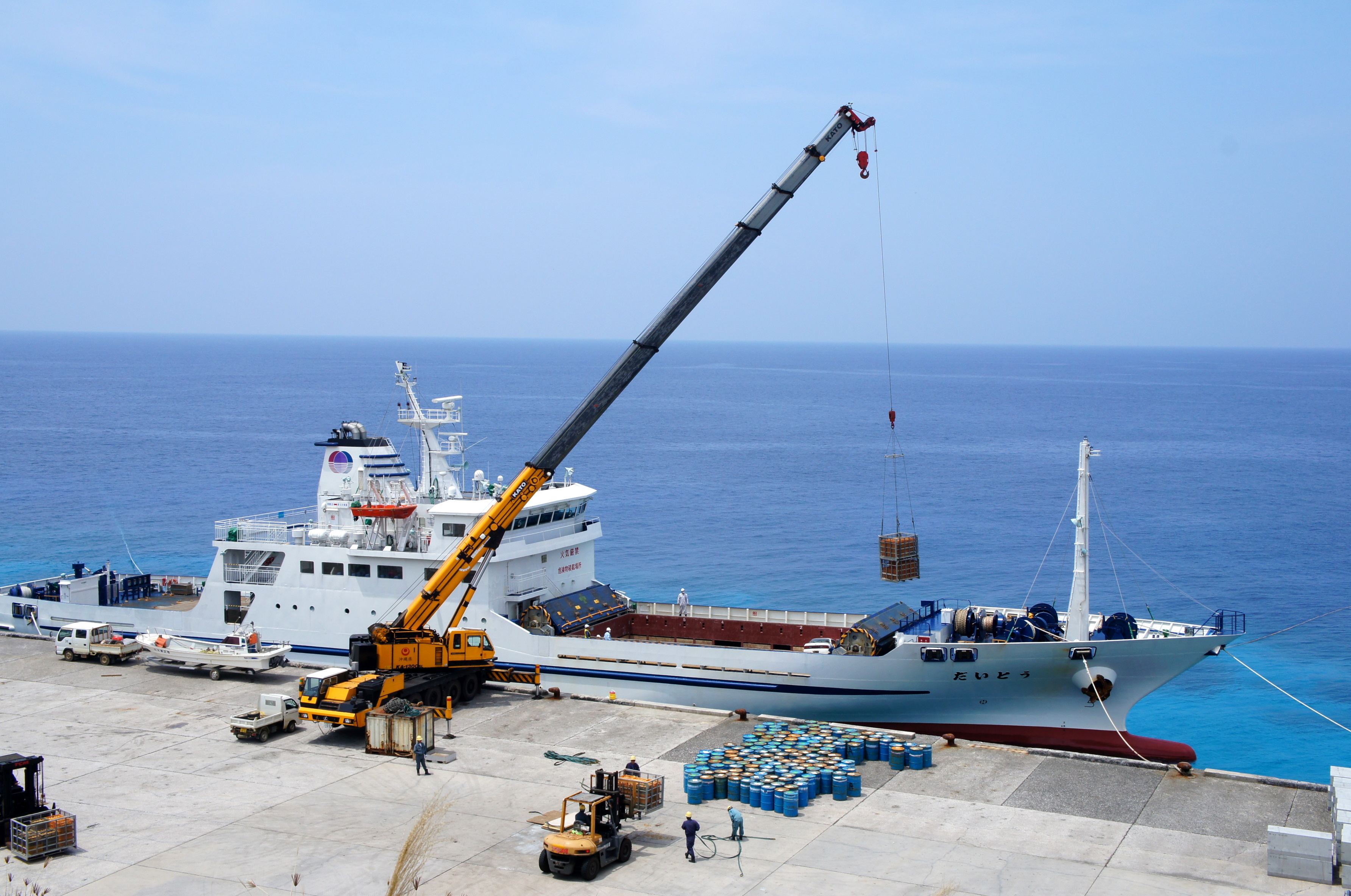 北大東島の西港にて燃料コンテナの荷役を行う貨客船だいとう。